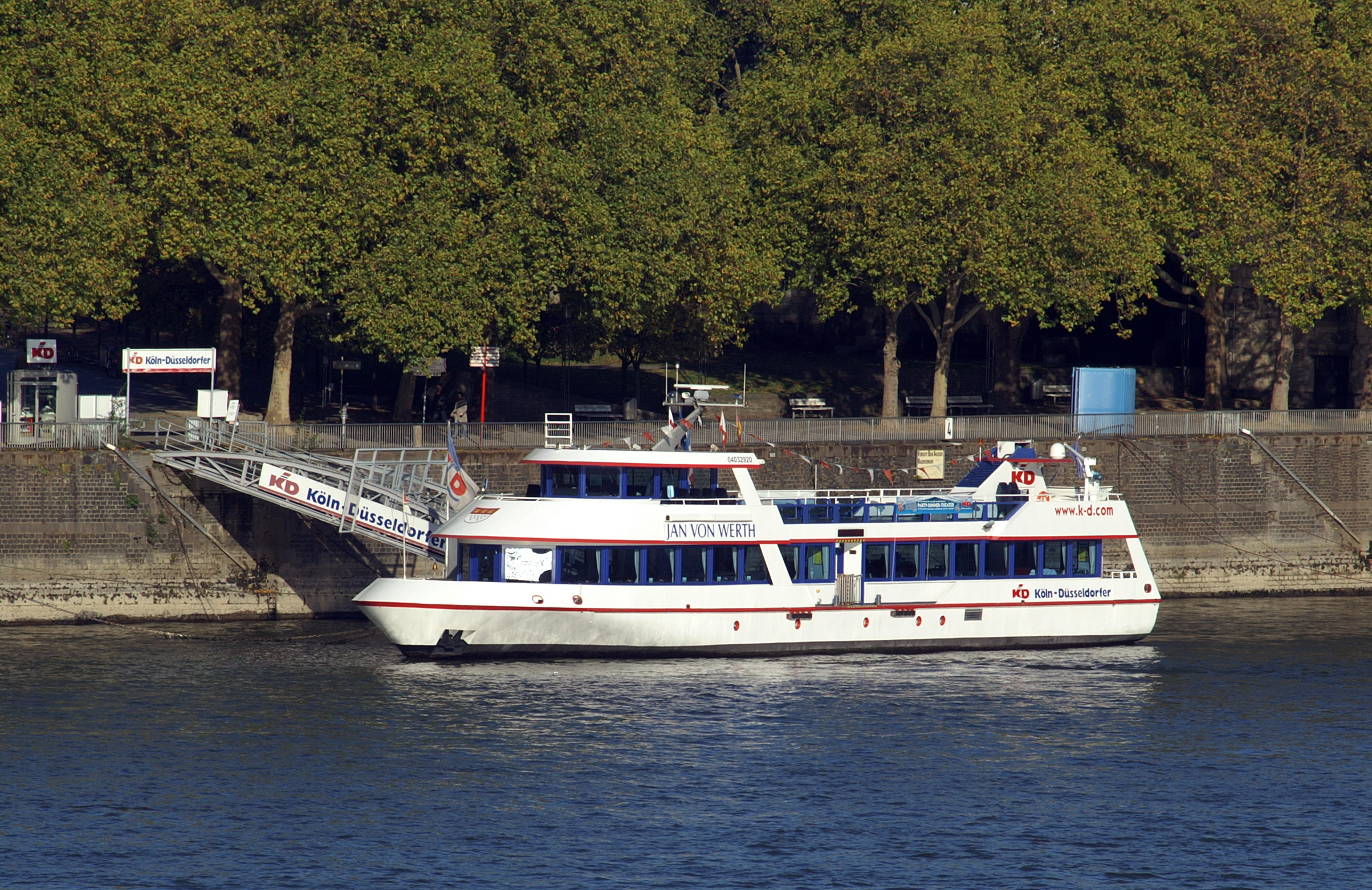 Das Kölner Rundfahrtschiff MS Jan von Werth der Köln-Düsseldorfer am Anleger in Köln